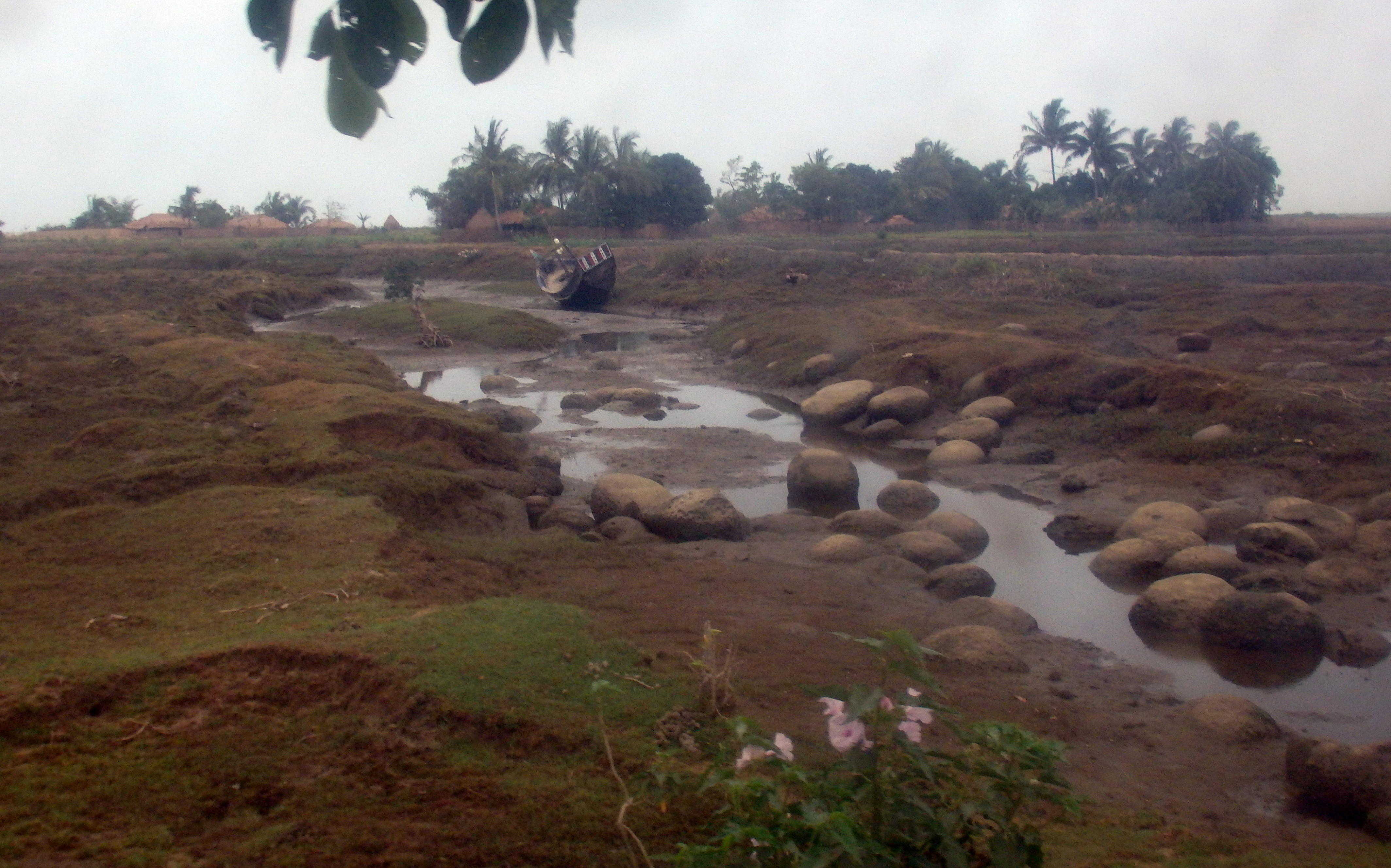 Anauk Myinhlut, Myanmar (Burma)